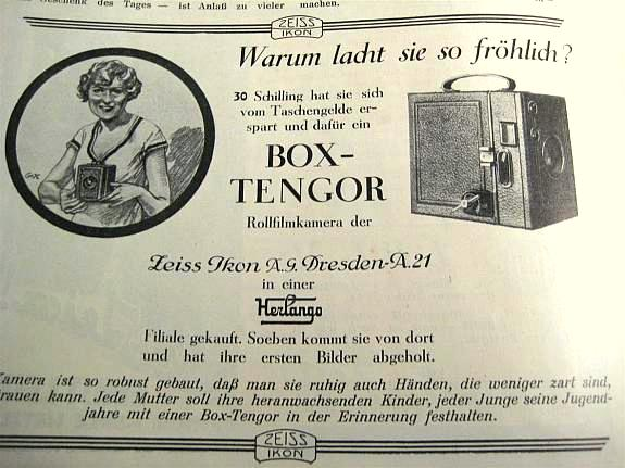 Kundenwerbung